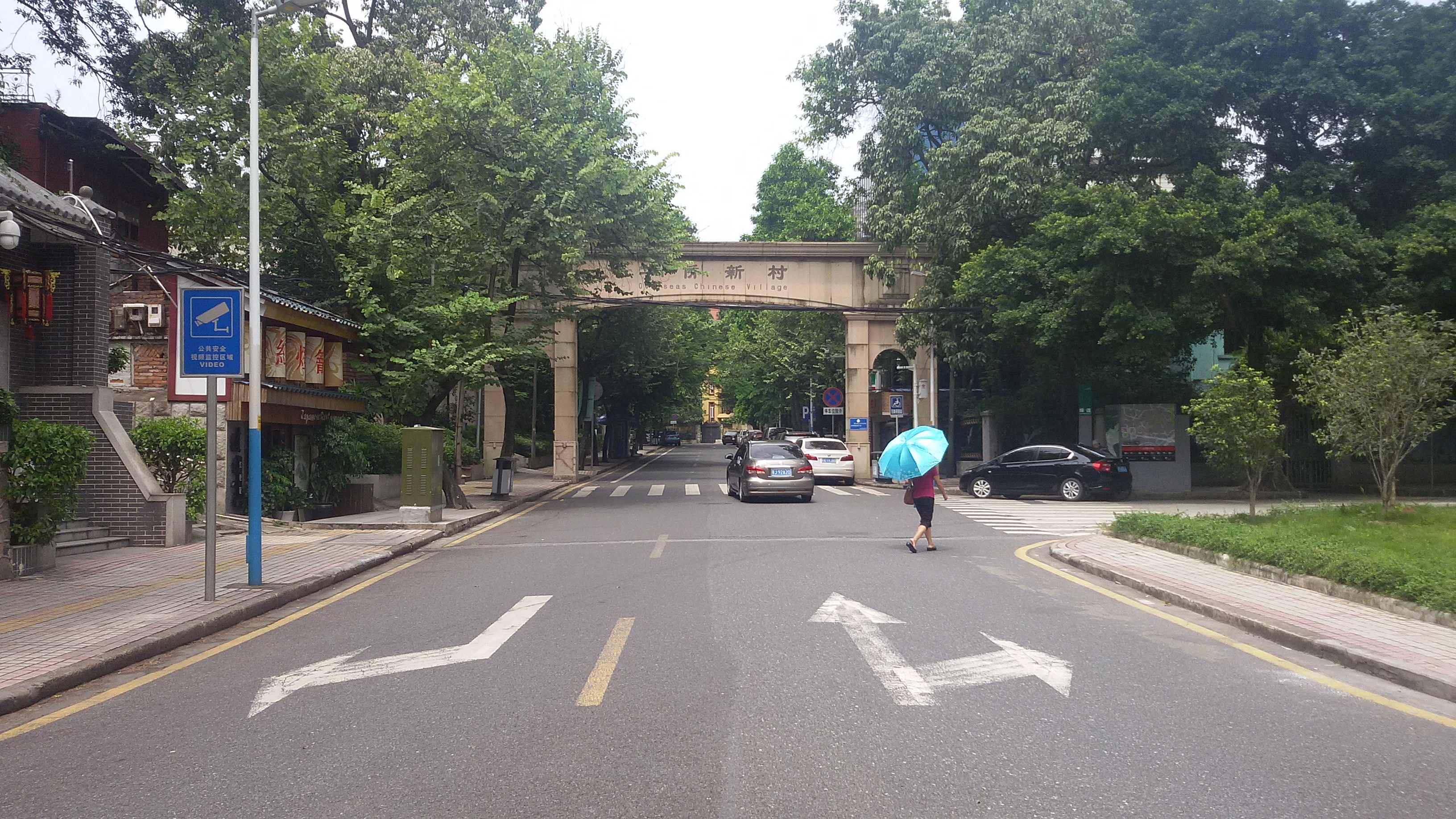 粵語: 華僑新村南邊嘅門口